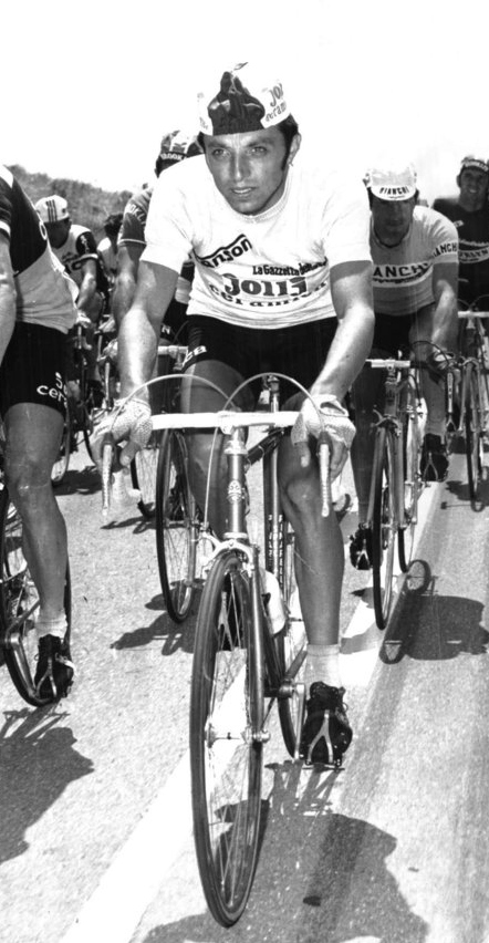 Fausto Bertoglio at the 1975 Giro d'Italia